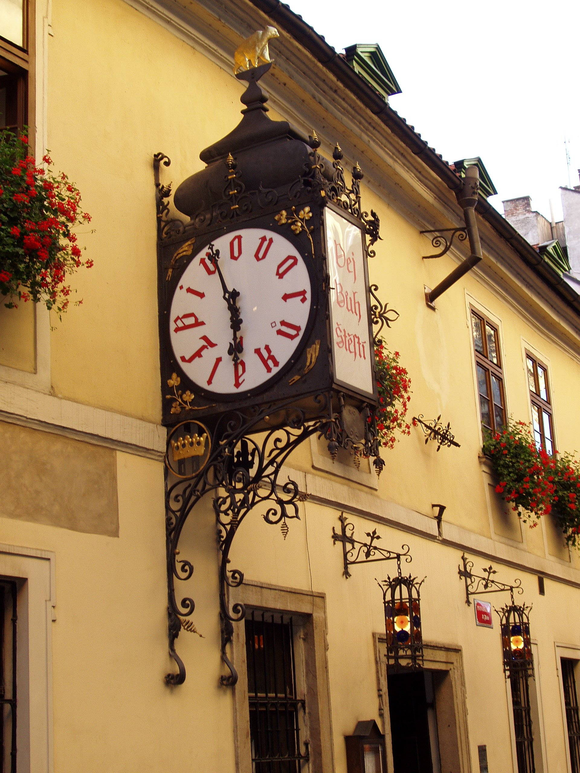 U Fleků